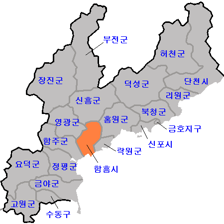 함경남도 행정구역 지도